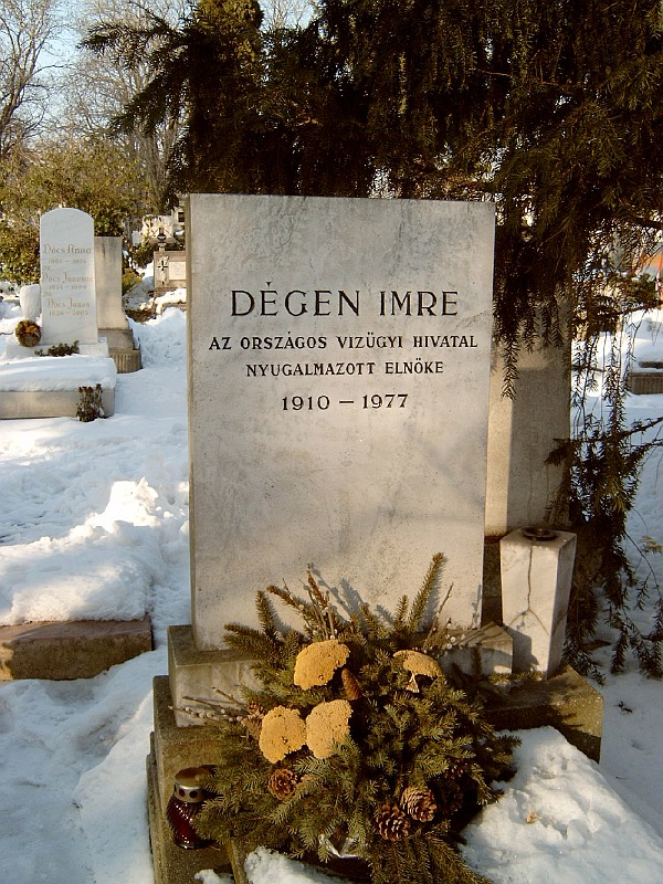 Dégen Imre (Miskolc, 1910. november 8. – Gyöngyös, 1977. június 16.) mérnök, c. egyetemi tanár, a vízügyi szolgálat vezetőjének sírja Budapesten. Farkasréti temető: 25-1-33